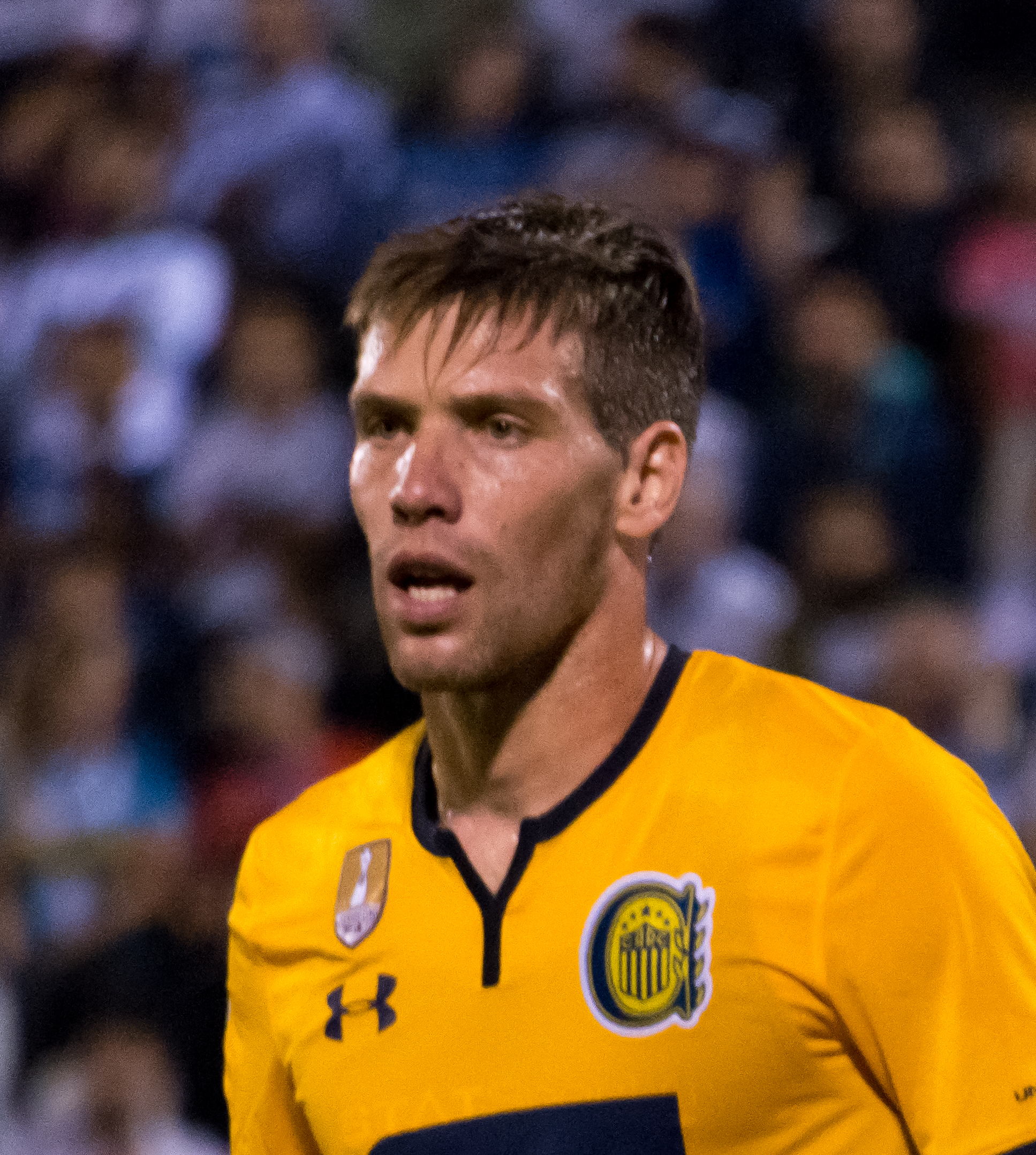 Claudio Riaño, Universidad Católica v Rosario Central, Estadio San Carlos de Apoquindo, Las Condes, Santiago, Chile.